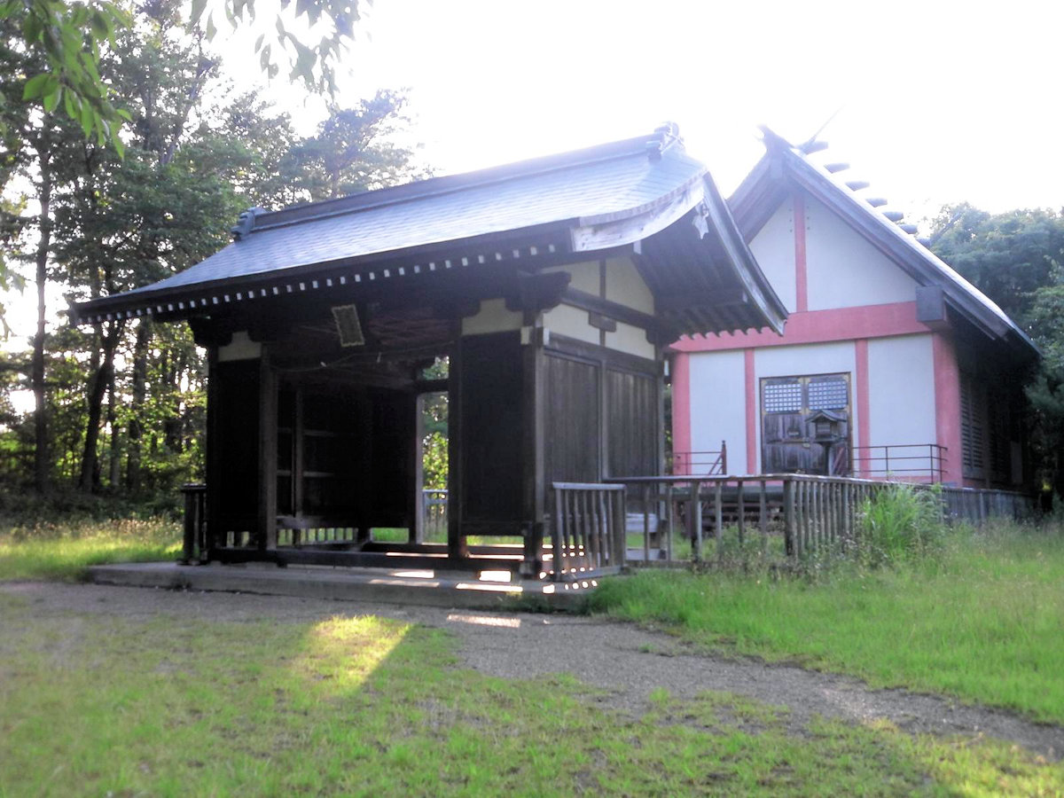 郡山市の山ノ井公園内にある采女神社